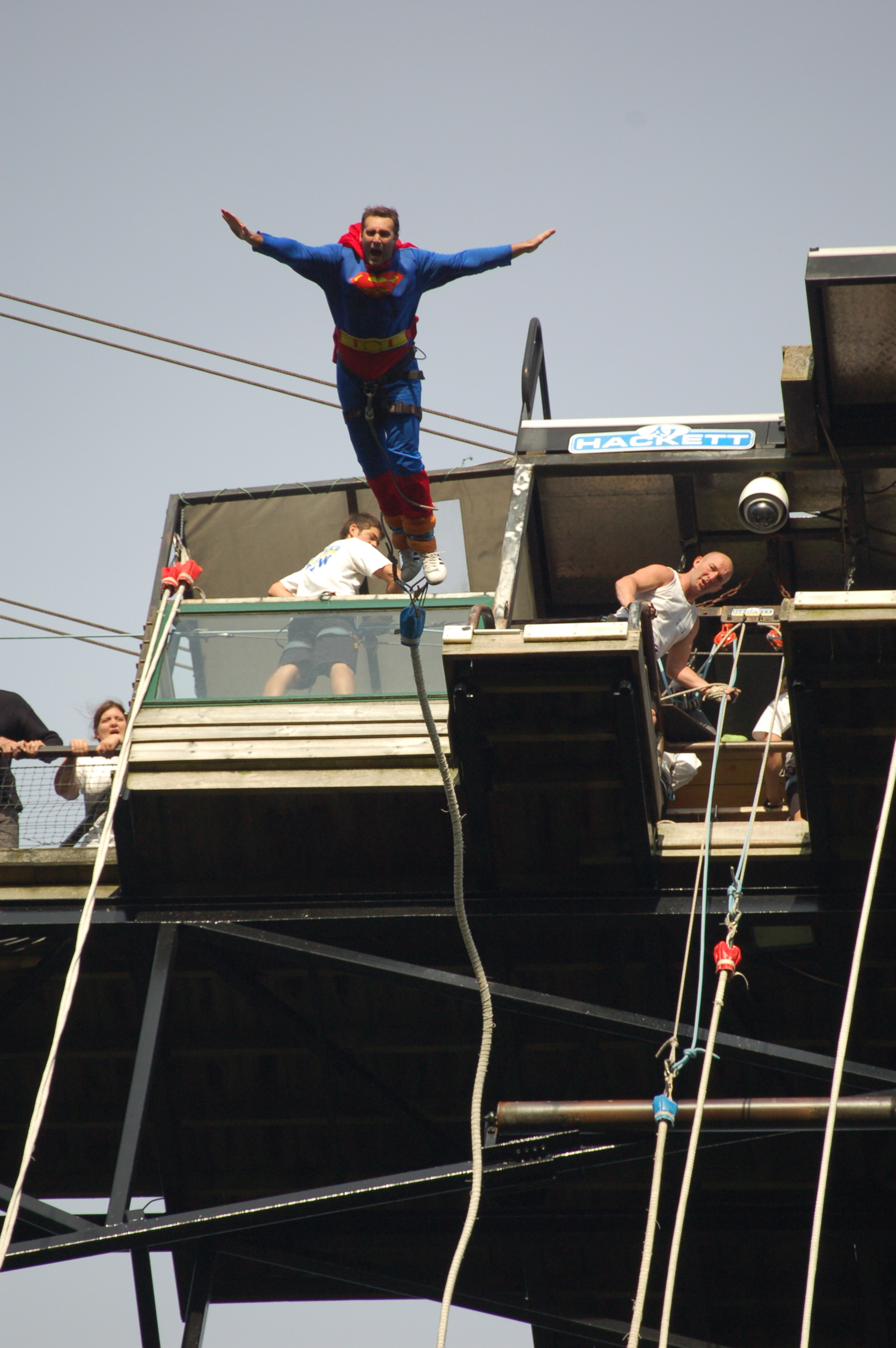 Saut à l'élastique Superman - Viaduc de la Souleuvre